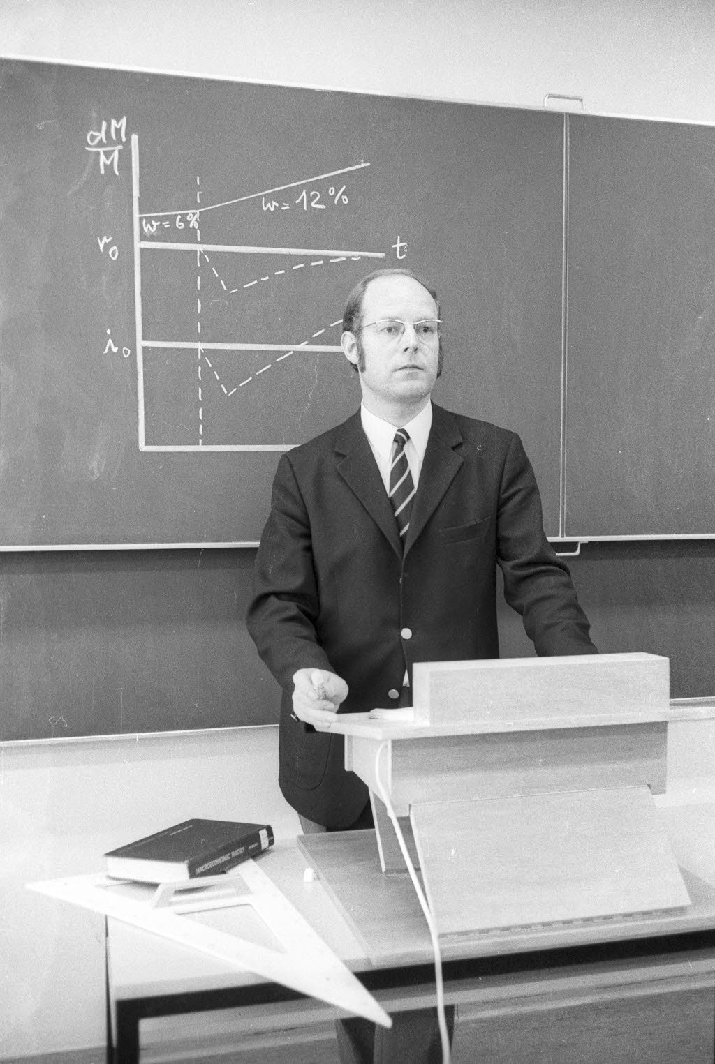 Vermutlich der Volkswirtschaftler Manfred Willms. Auf dem Pult liegt ein Werk über "Macroeconomic Theory".